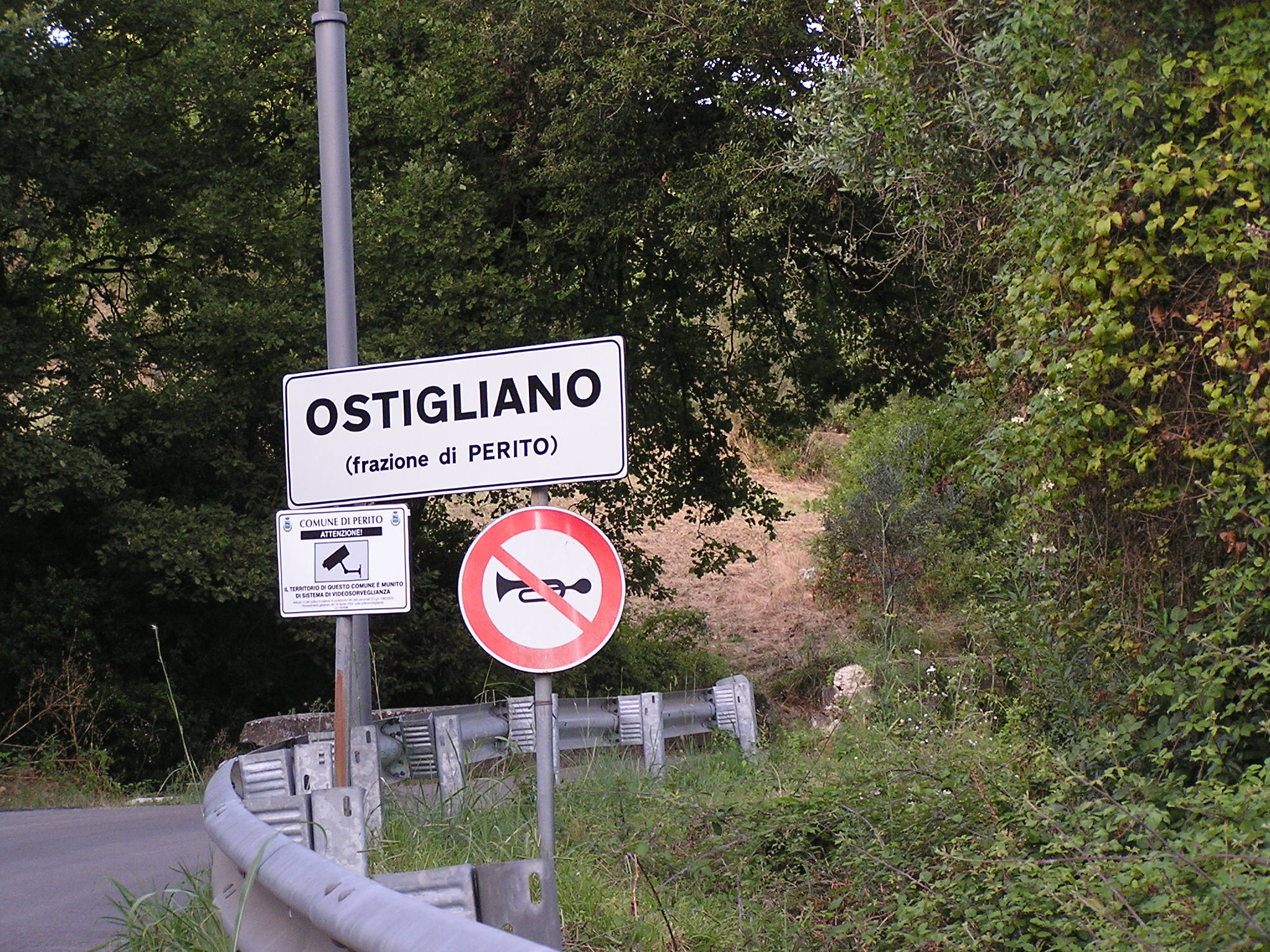 Cartello stradale che segnala l'inizio del centro abitato di Ostigliano.